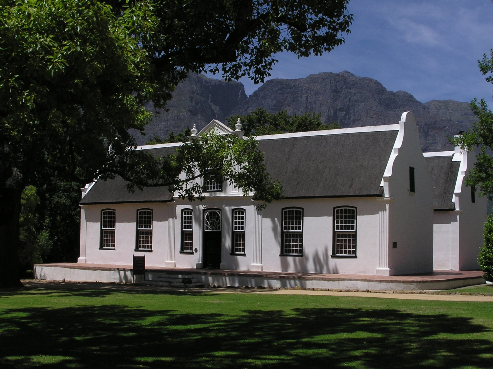 Boschendal, Das H-förmige Manorhouse von 1812